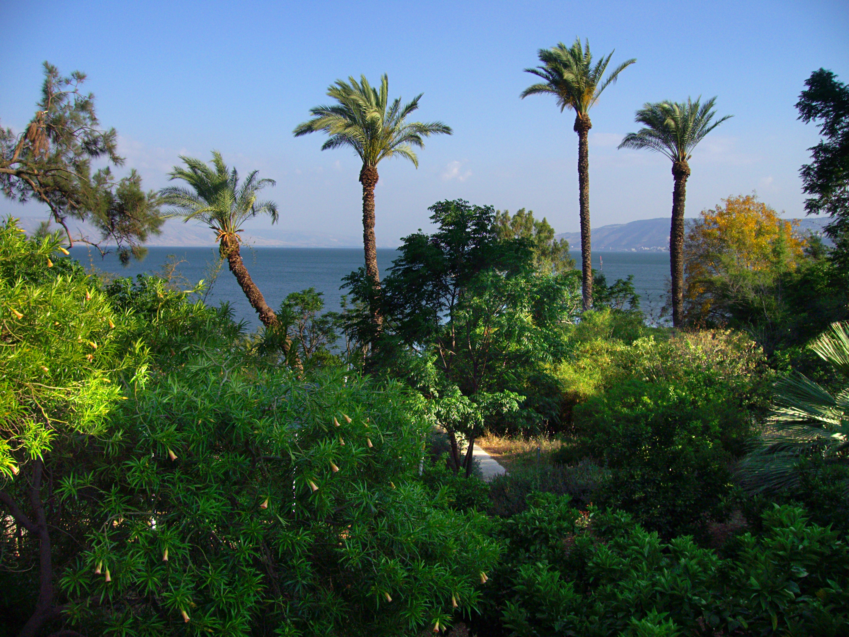 Blick auf den See Genezareth in der Abendsonne in Tabgha (Ein Sheva).